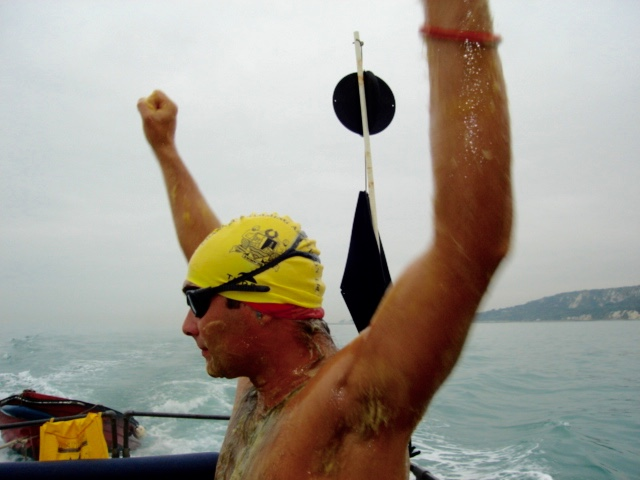 Départ traversée de la Manche